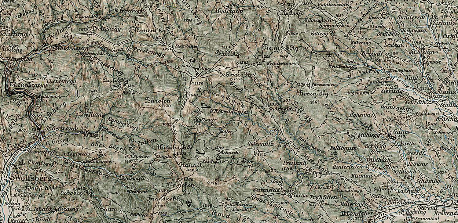 Schwarzkogelzug zwischen Wolfsberg und Deutschlandsberg mit Preitenegg, Twimberg, Hebalm, Mitterspiel